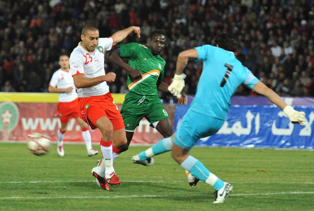 MAROC vs NIGER